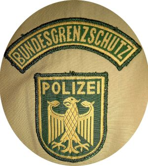 Bildbeschreibung: Ärmelabzeichen des Bundesgrenzschutzes (BGS)